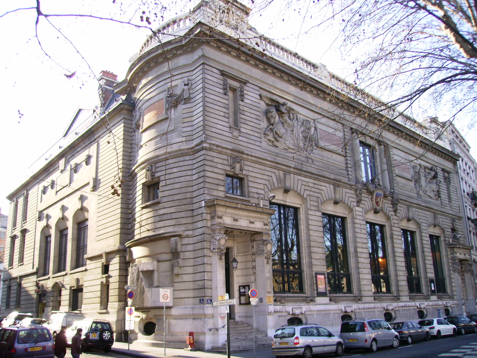 Salle Molière Lyon 5e